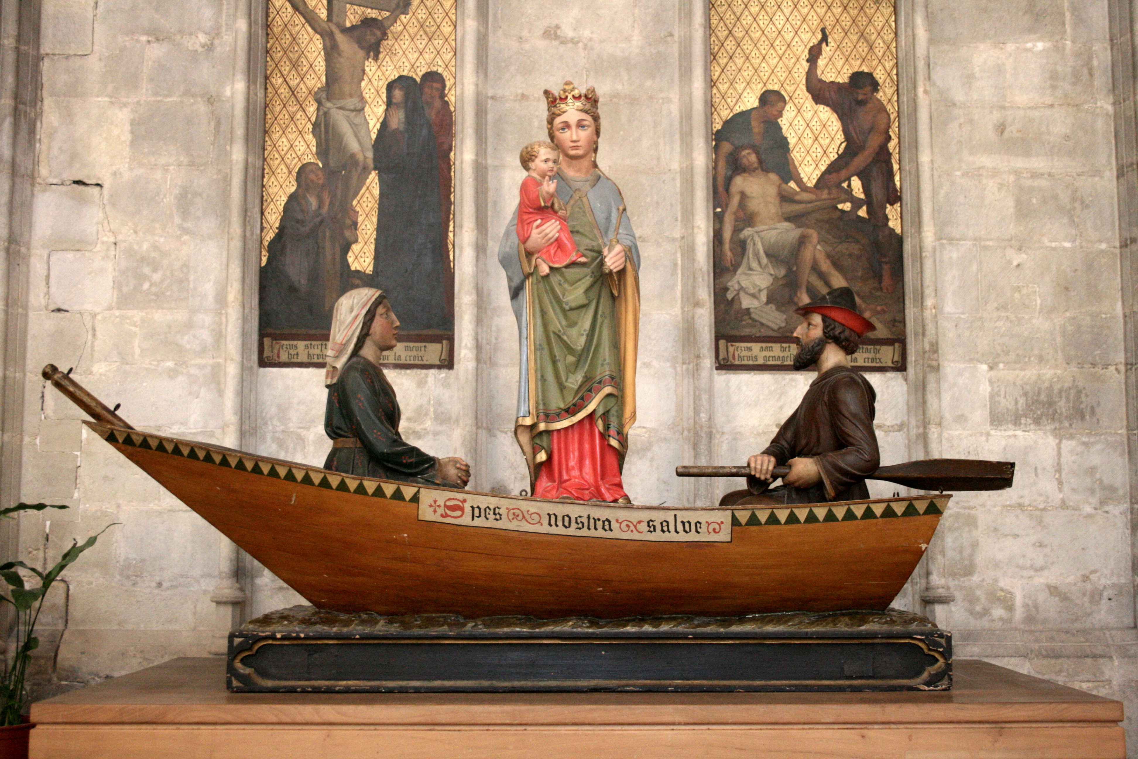 Eglise Notre-Dame du Sablon, Bruxelles (Belgique). Maquette de barque rappelant l'épisode au cours duquel la statue de Notre-Dame fut amenée d'Anvers au Sablon en 1348